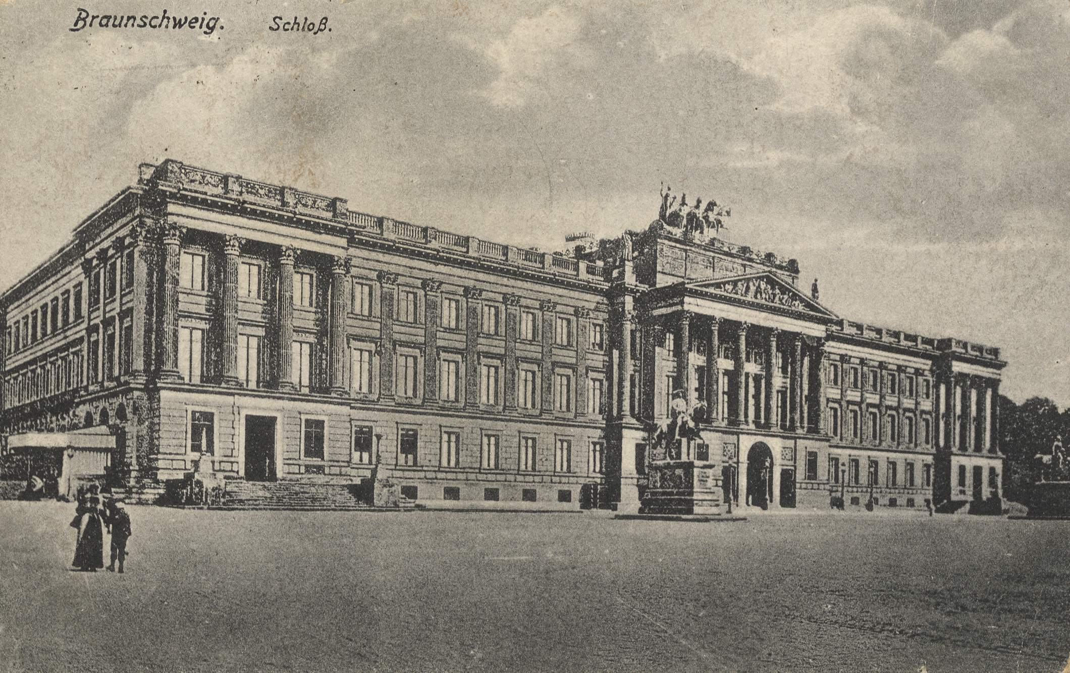 Schloss